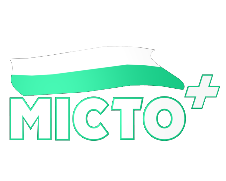 Логотип телеканалу "Місто+"